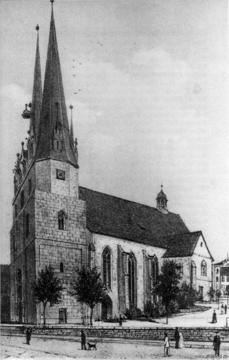 Alfeld (Leine), ev.-luth. St.-Nicolai-Kirche, um 1860